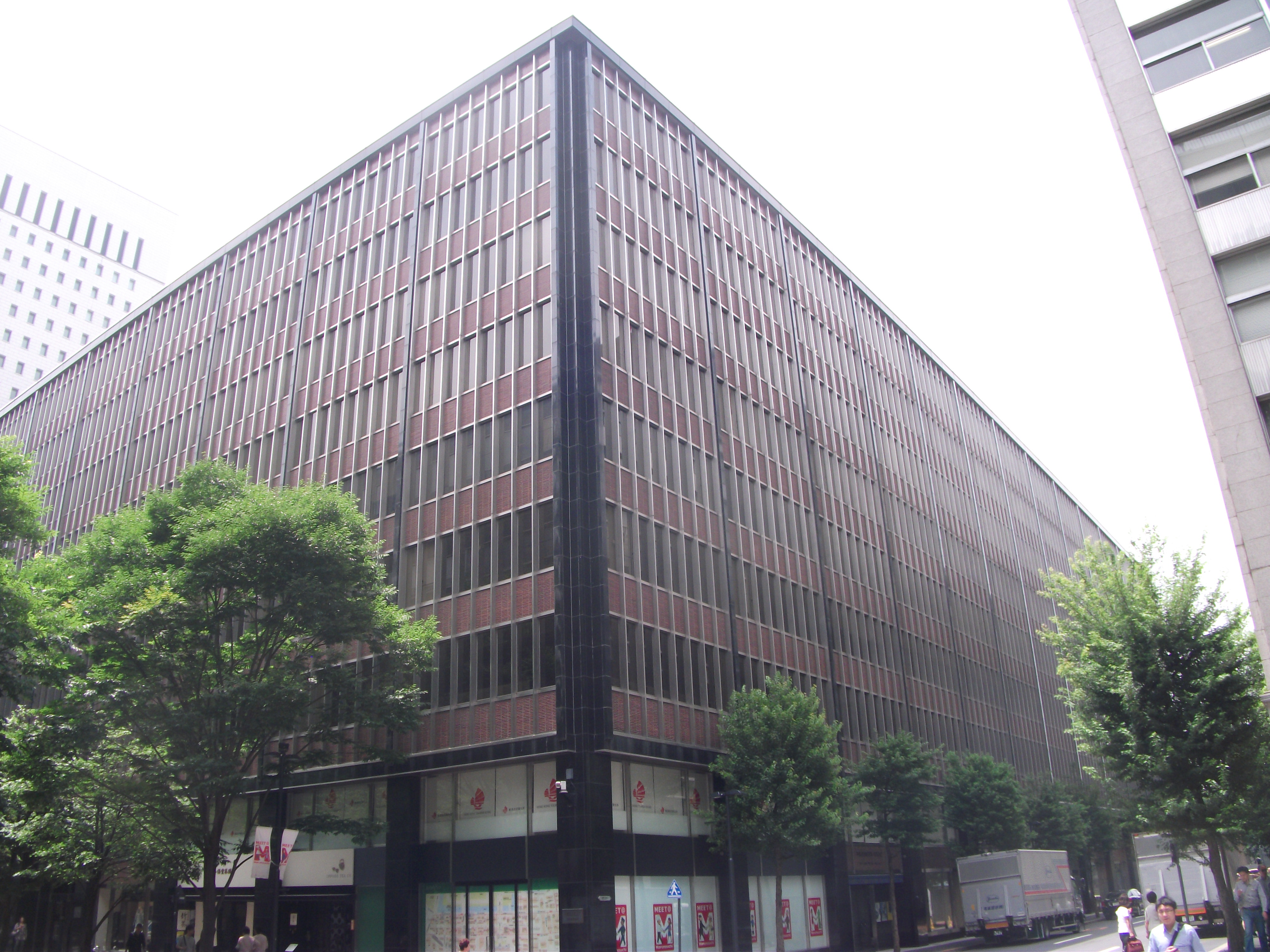 東京・丸の内、国際ビルヂング（帝劇ビル）北東角